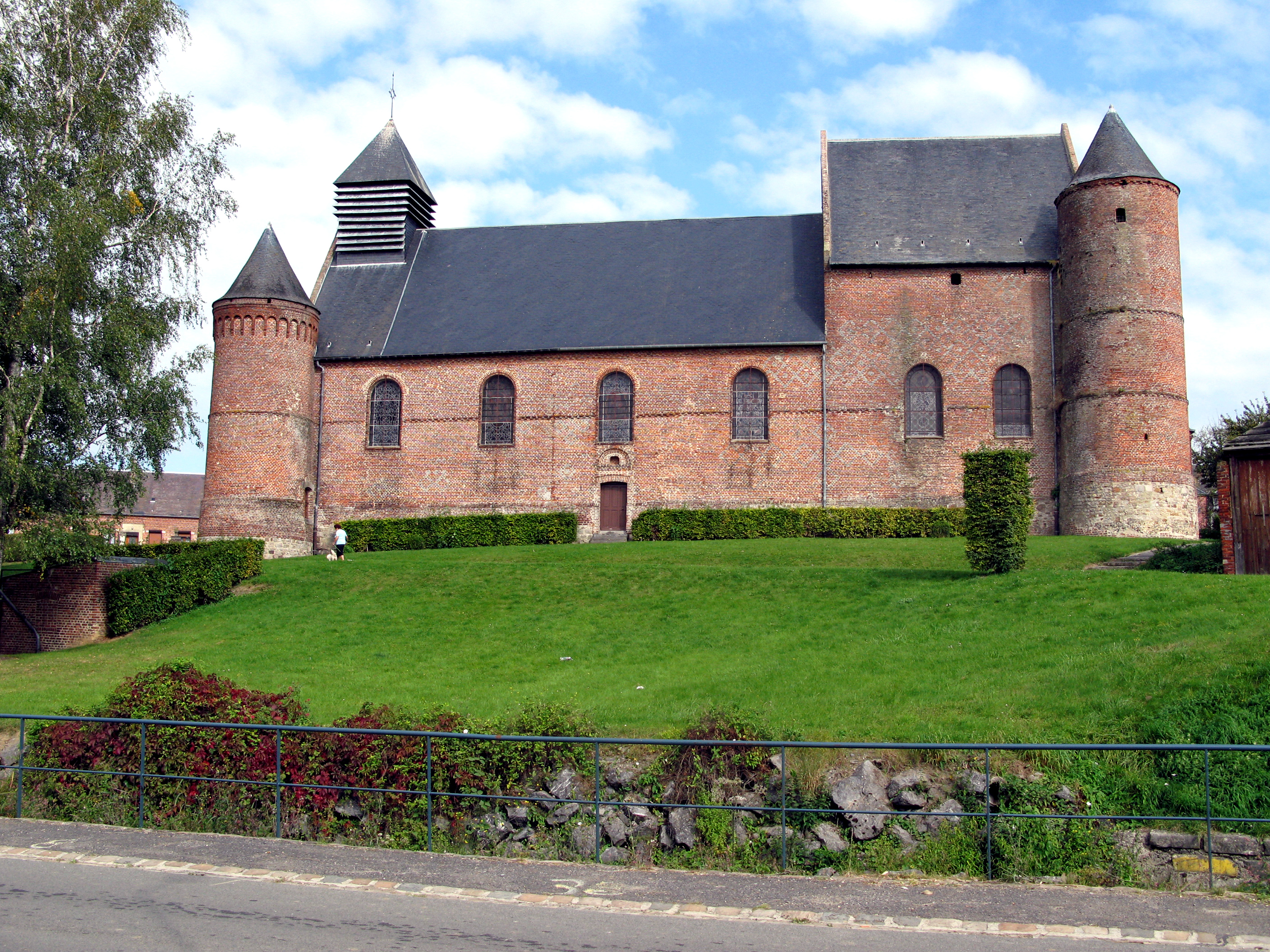 Esquéhéries (Aisne, France) L'église fortifiée. Au premier plan, la rue est bordée d'une rampe protectrice. Elle protège les véhicules et les passants d'une chute dans le petit ruisseau qui permet d'imaginer (avec les haies aujourd'hui disparues) la variété des types de défense "passive" et naturelle de l'édifice, autrefois.